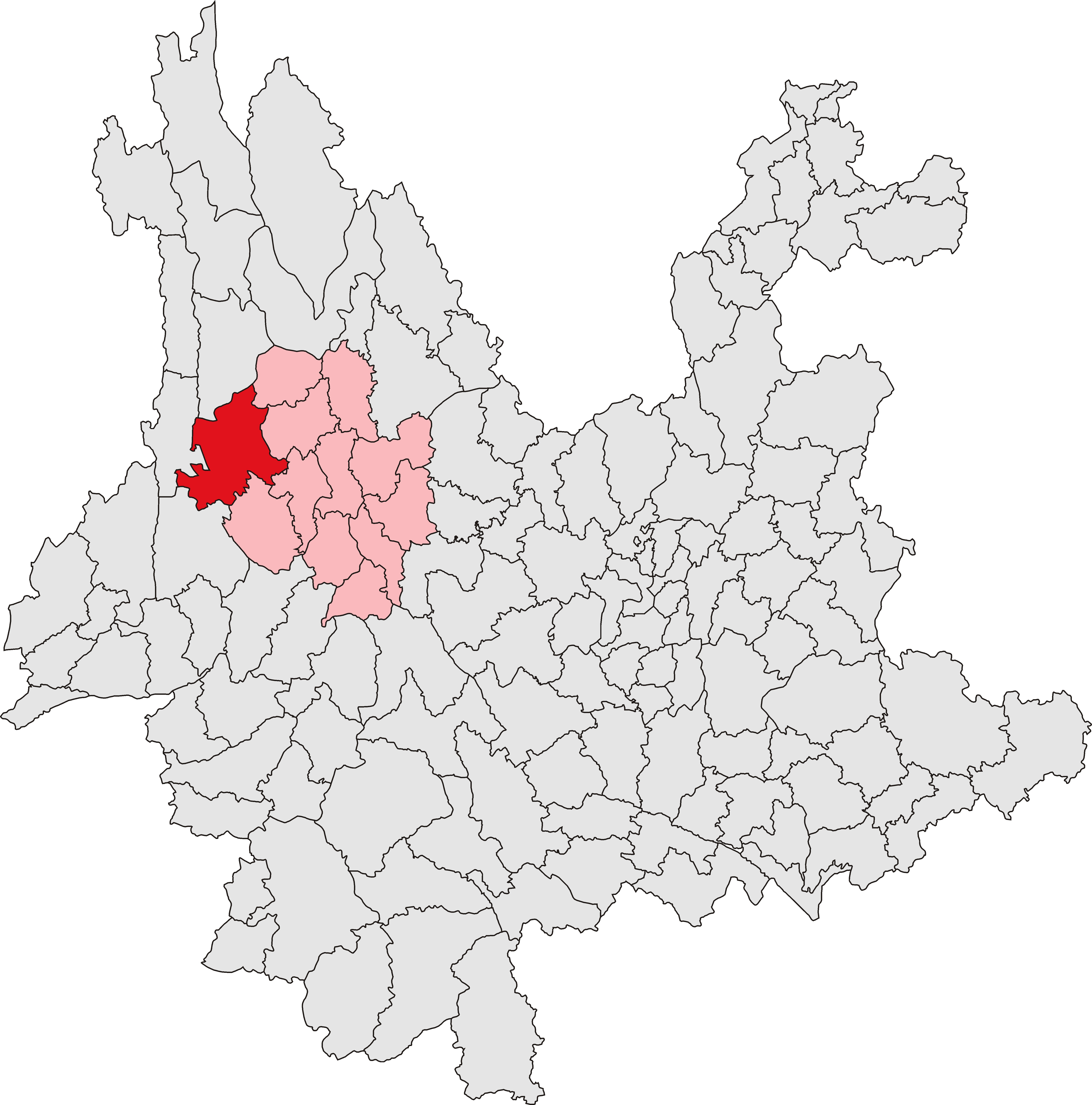 中文（中国大陆）: 云龙县位置图